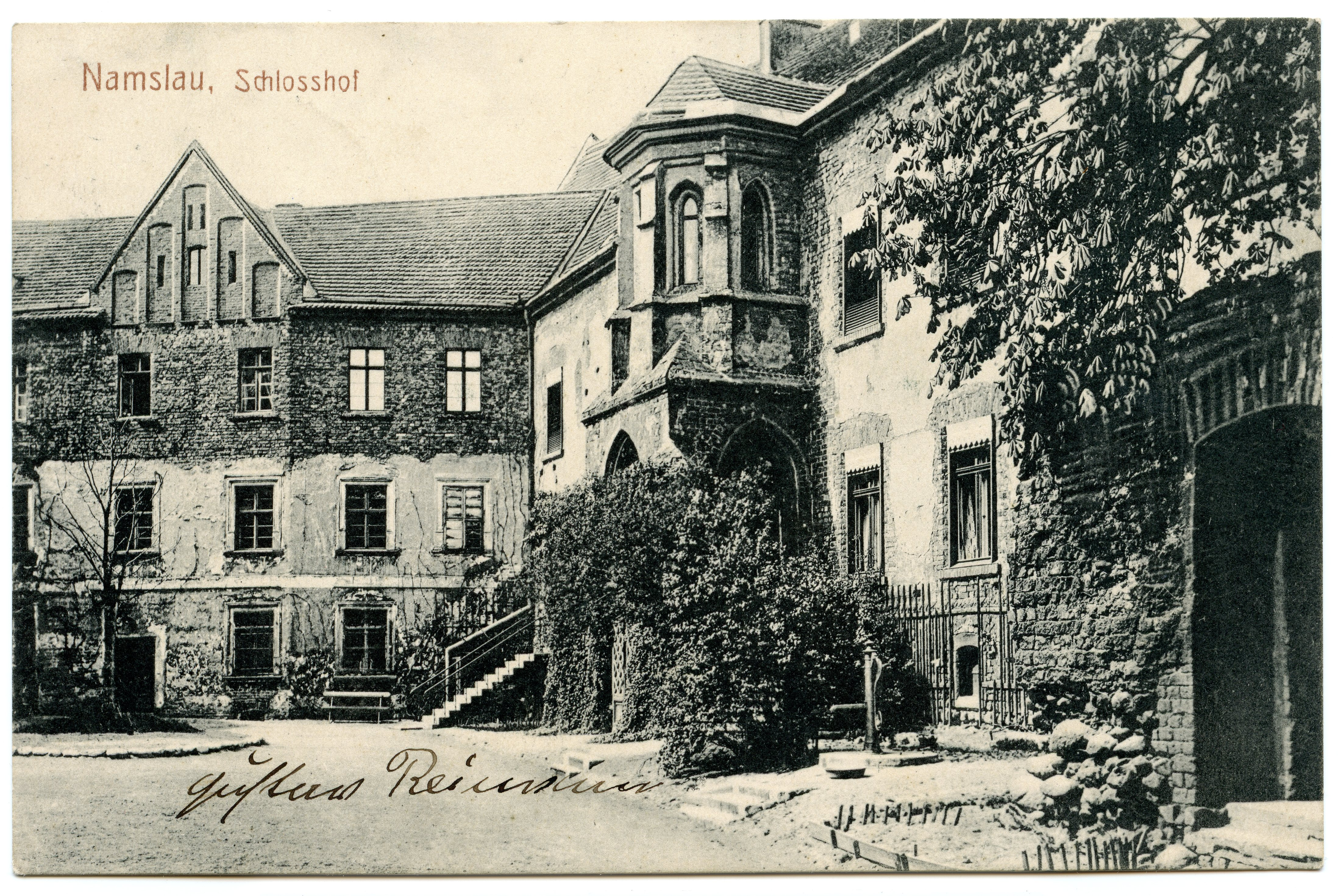 Dziedziniec zamku w Namysłowie, na pocztówce z obiegu, wysłanej 25 IX (lub X) 1911 r. Wydawca: "2181. Verlag von A. Toebe, Namslau." "38 082 b" Pocztówka w zbiorze prywatnym Roberta Pieńkowskiego we Wrocławiu